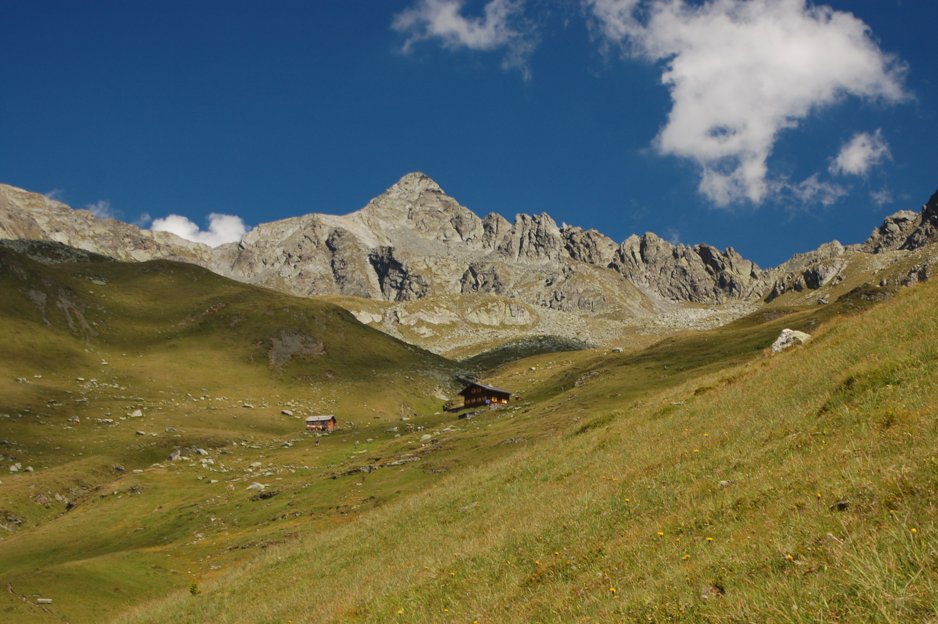 Die Seespitze mit der Seespitzhütte